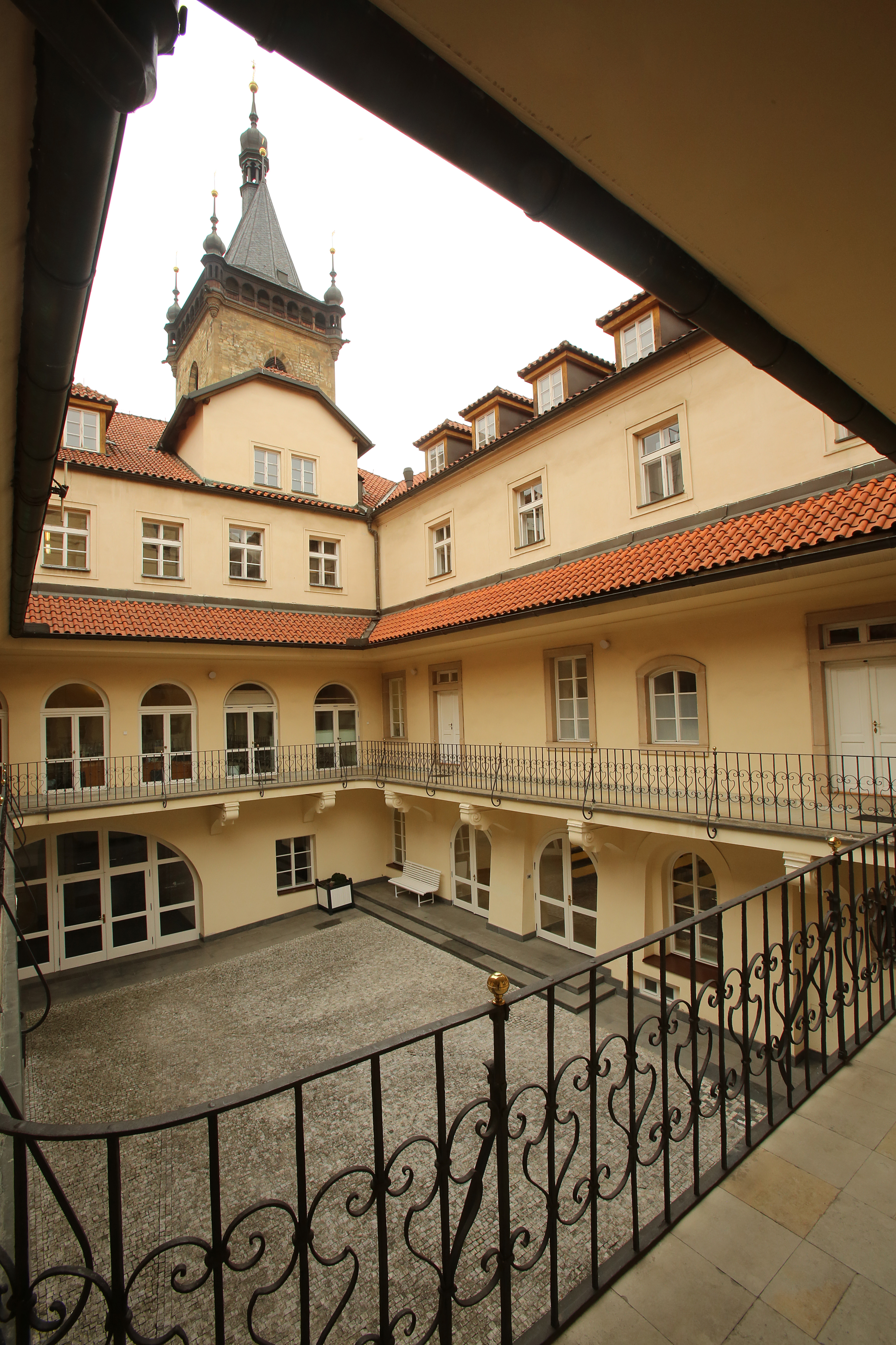 Braunův dům - pohled do atria z výšky